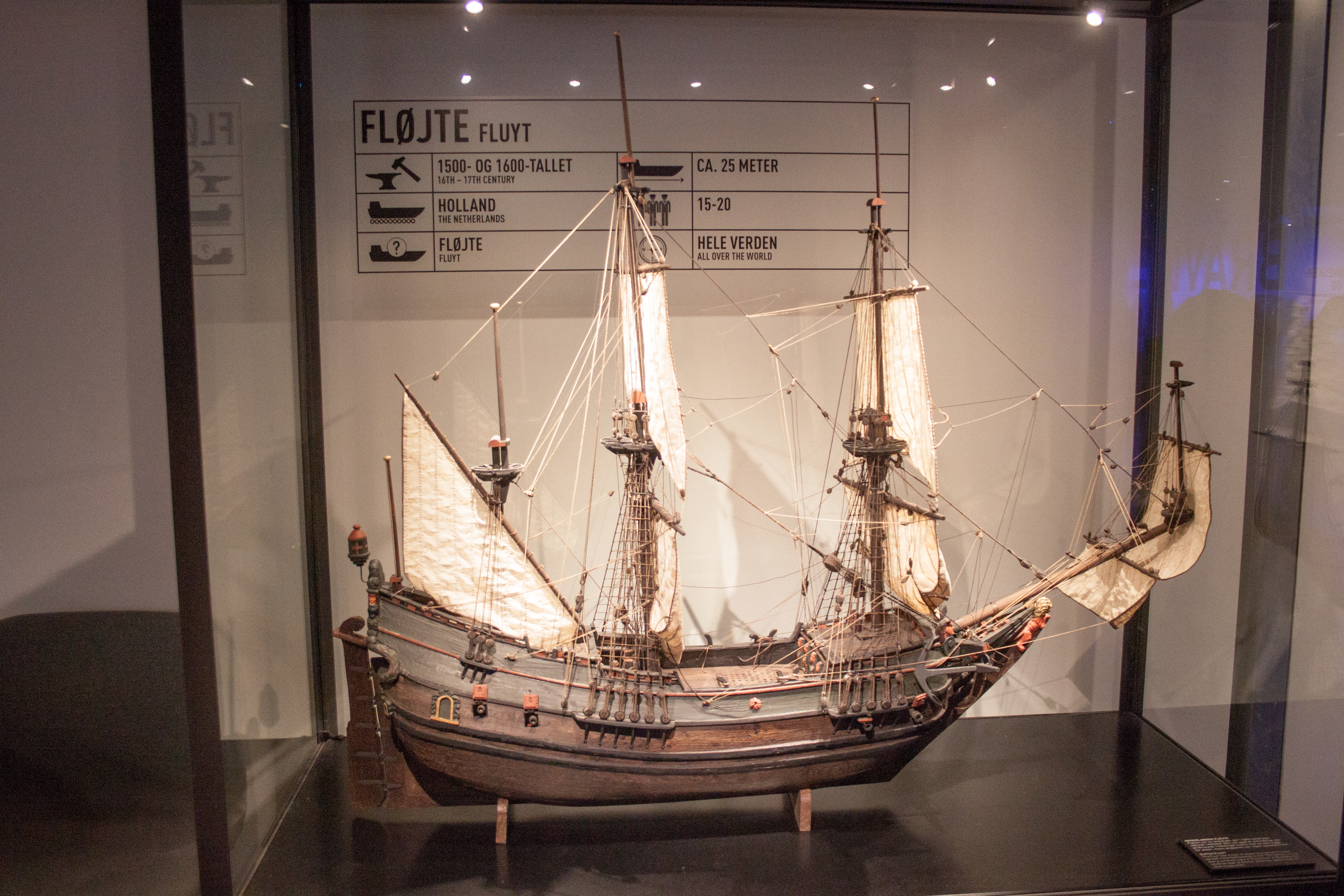 Model_of_a fluytlabel QS:Len,"Model_of_a fluyt" label QS:Lhu,"Felute modellje a 16-17. századból"